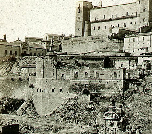 Convento del Carmen Calzado. Toledo.